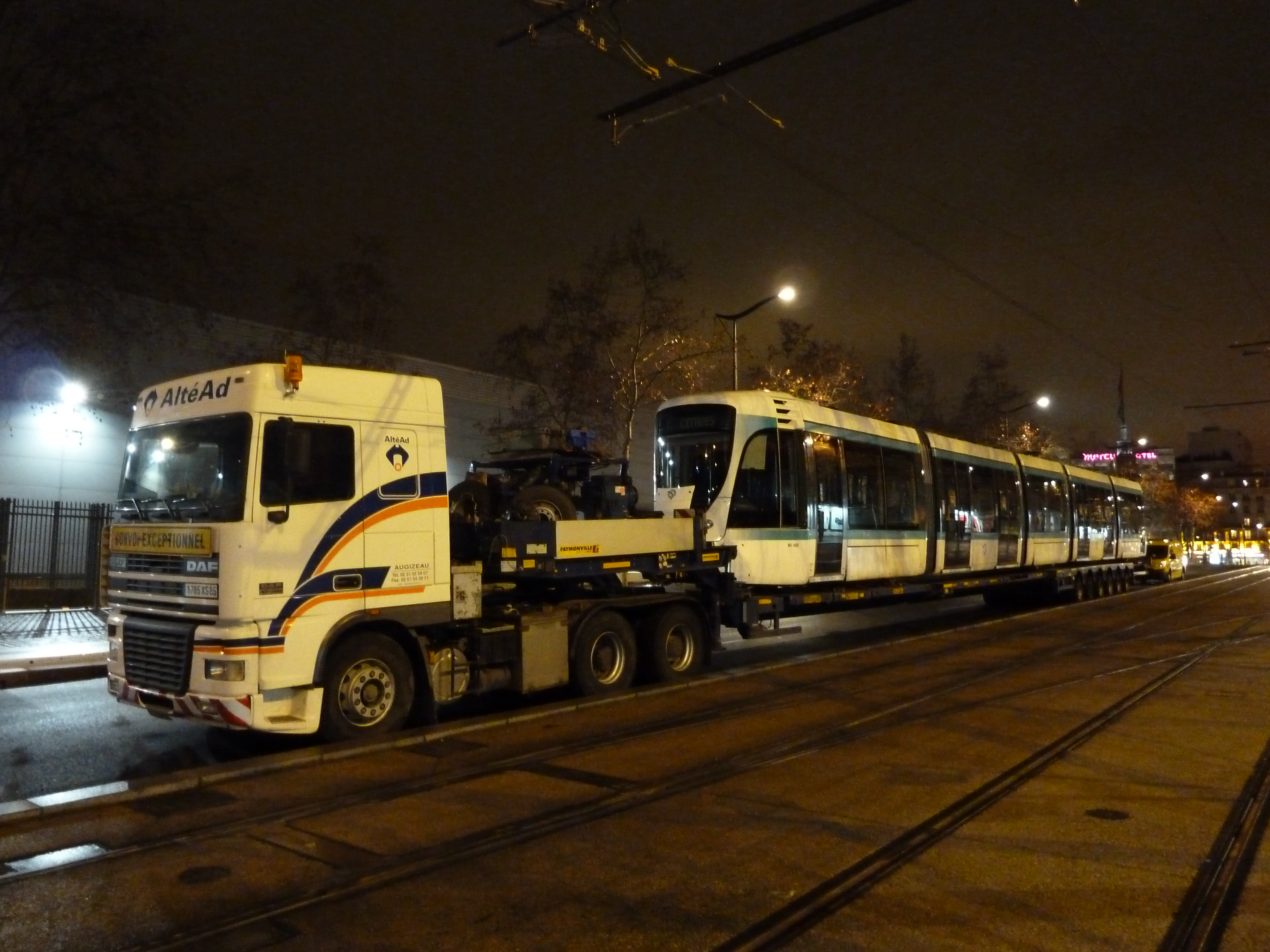 Convoi exceptionnel pour le transfert de matériel roulant du T2 de Porte de Versailles à Colombes en vue de l'extension au nord.